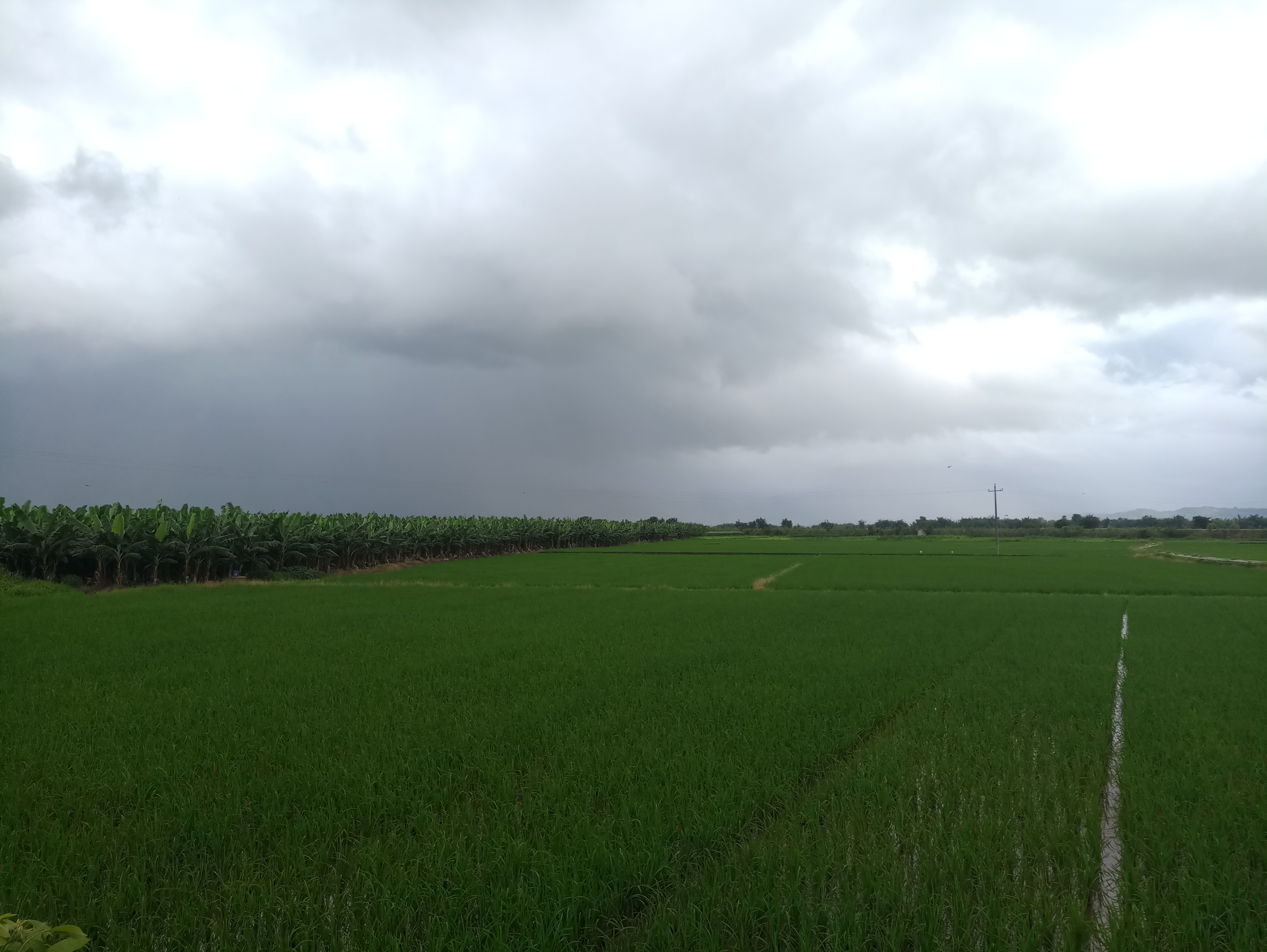 中文（中国大陆）: 瑞丽农场-弄岛分场